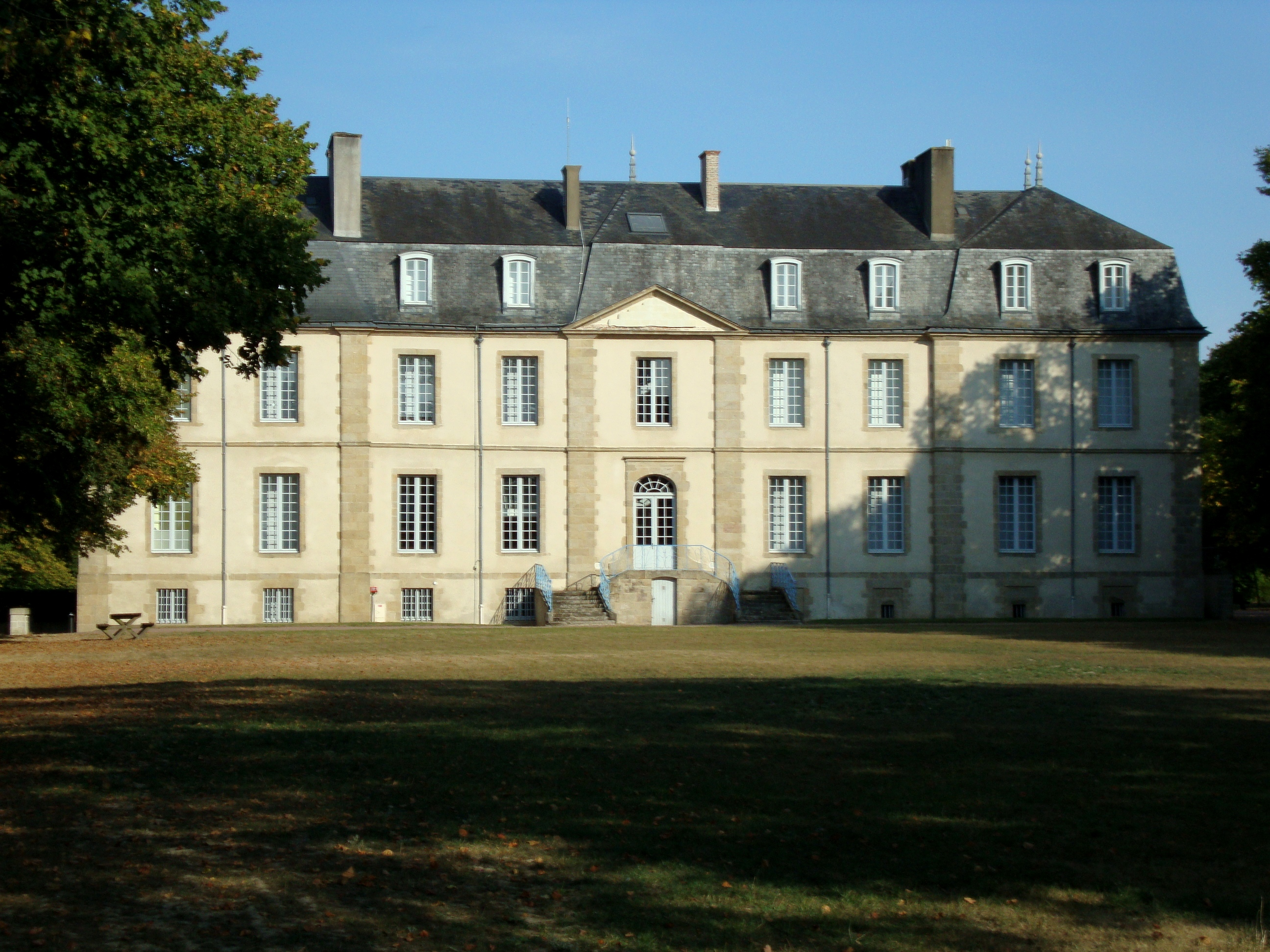 Château de Landebaudière, (Inscrit, 1981) .